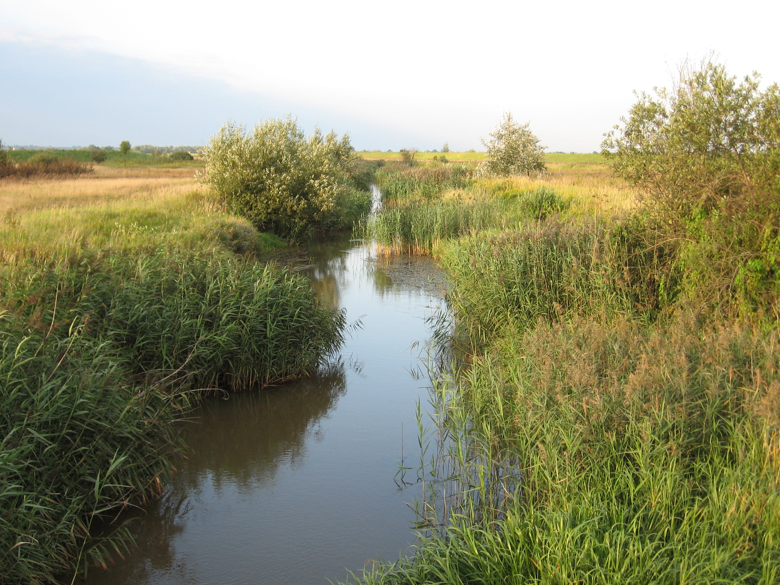 Rzeka Trześniówka, w pobliżu wsi Trześń / Trześniówka River in Poland, near Trześń